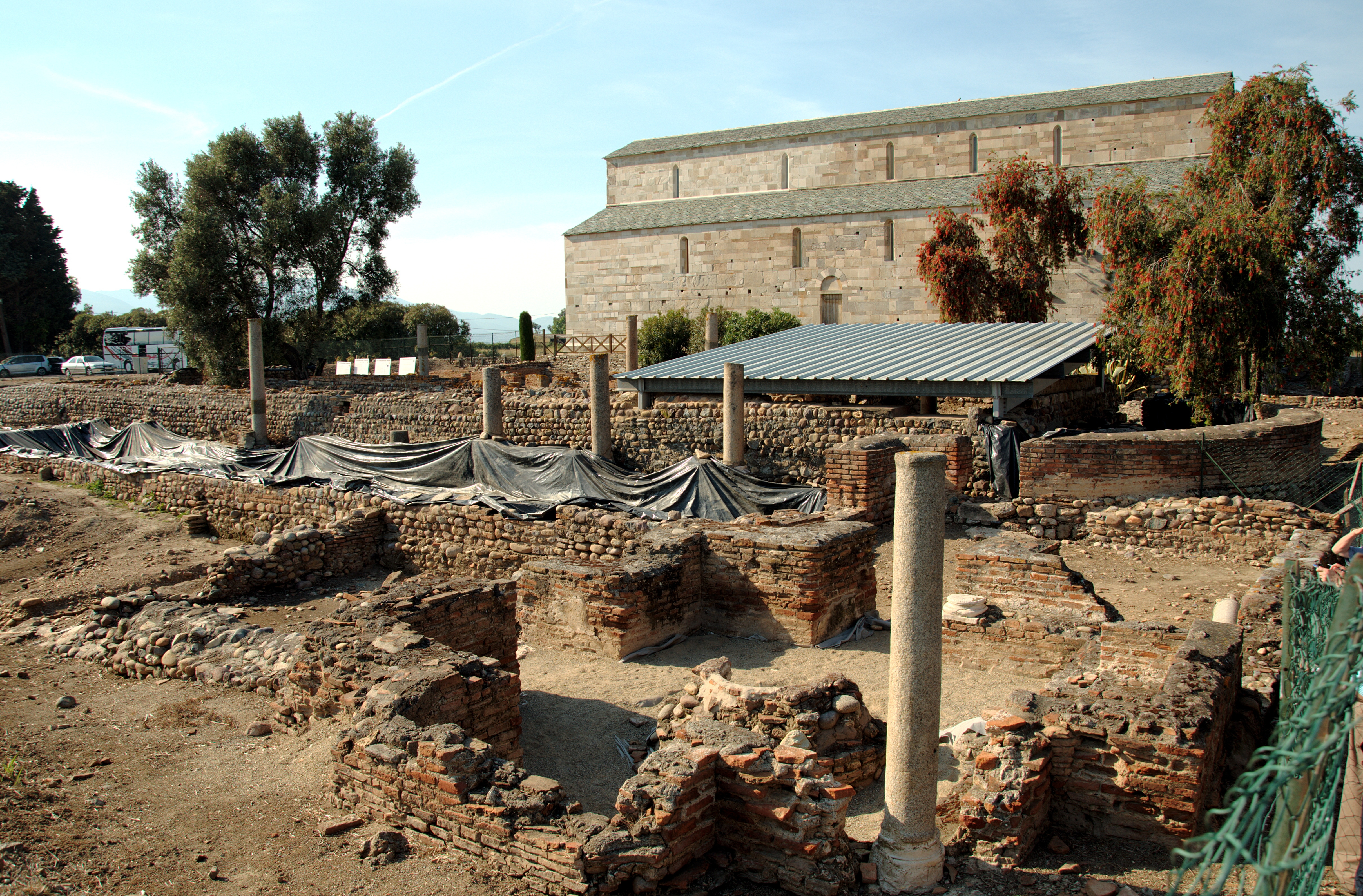 Археологические раскопки Марианы и Успенский собор 1119 года (Корсика).